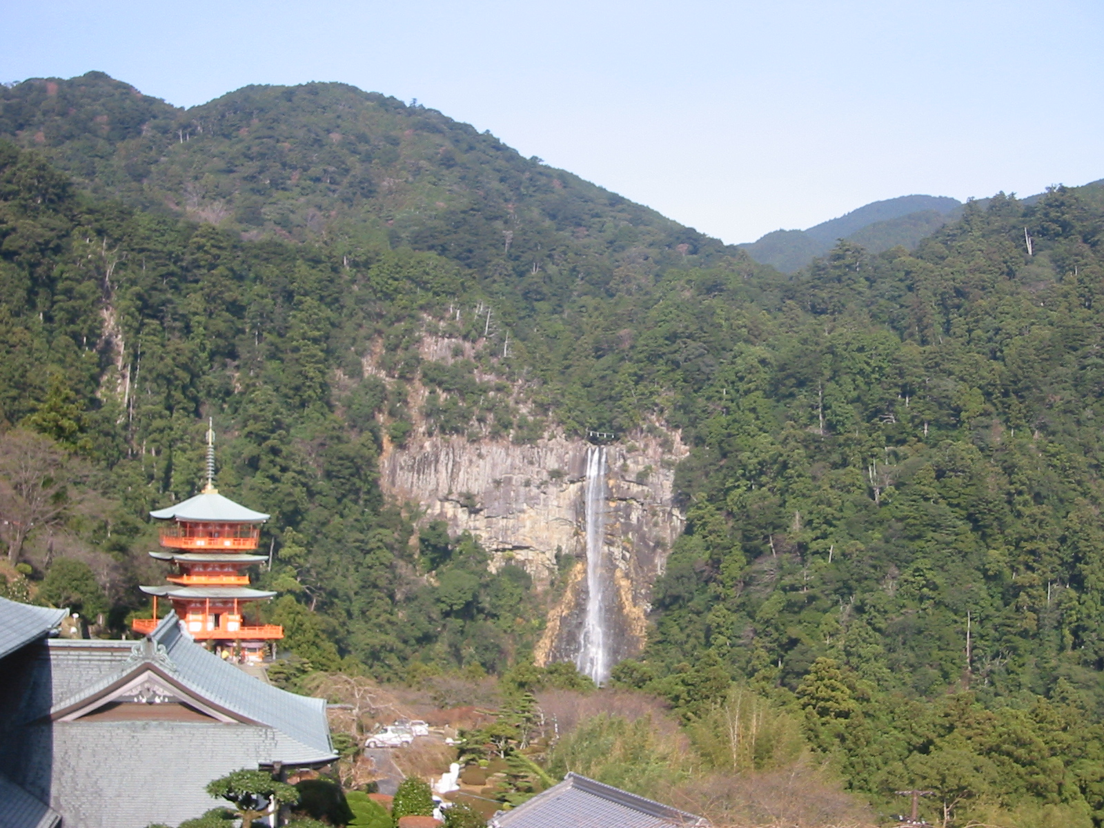 青岸渡寺